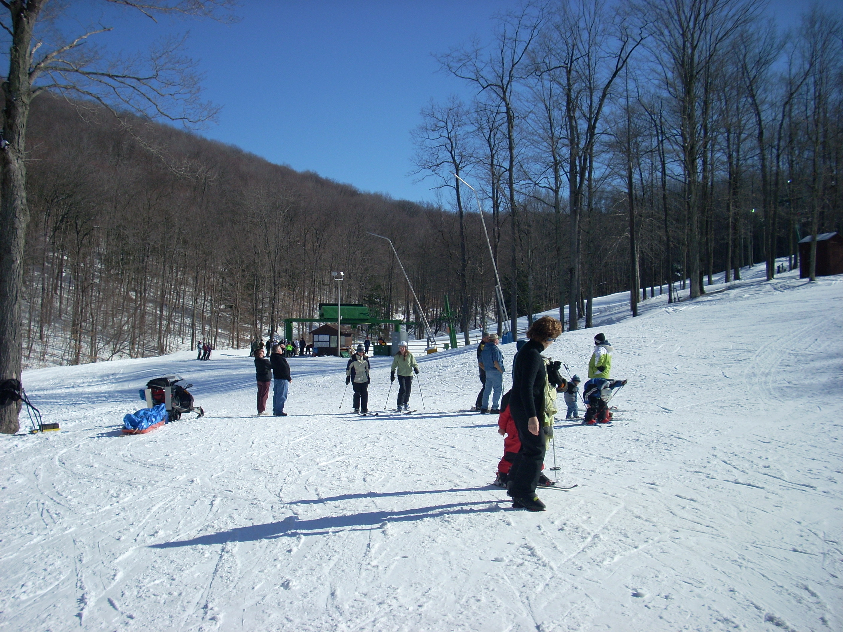 Skiing at Denton Hill State Park